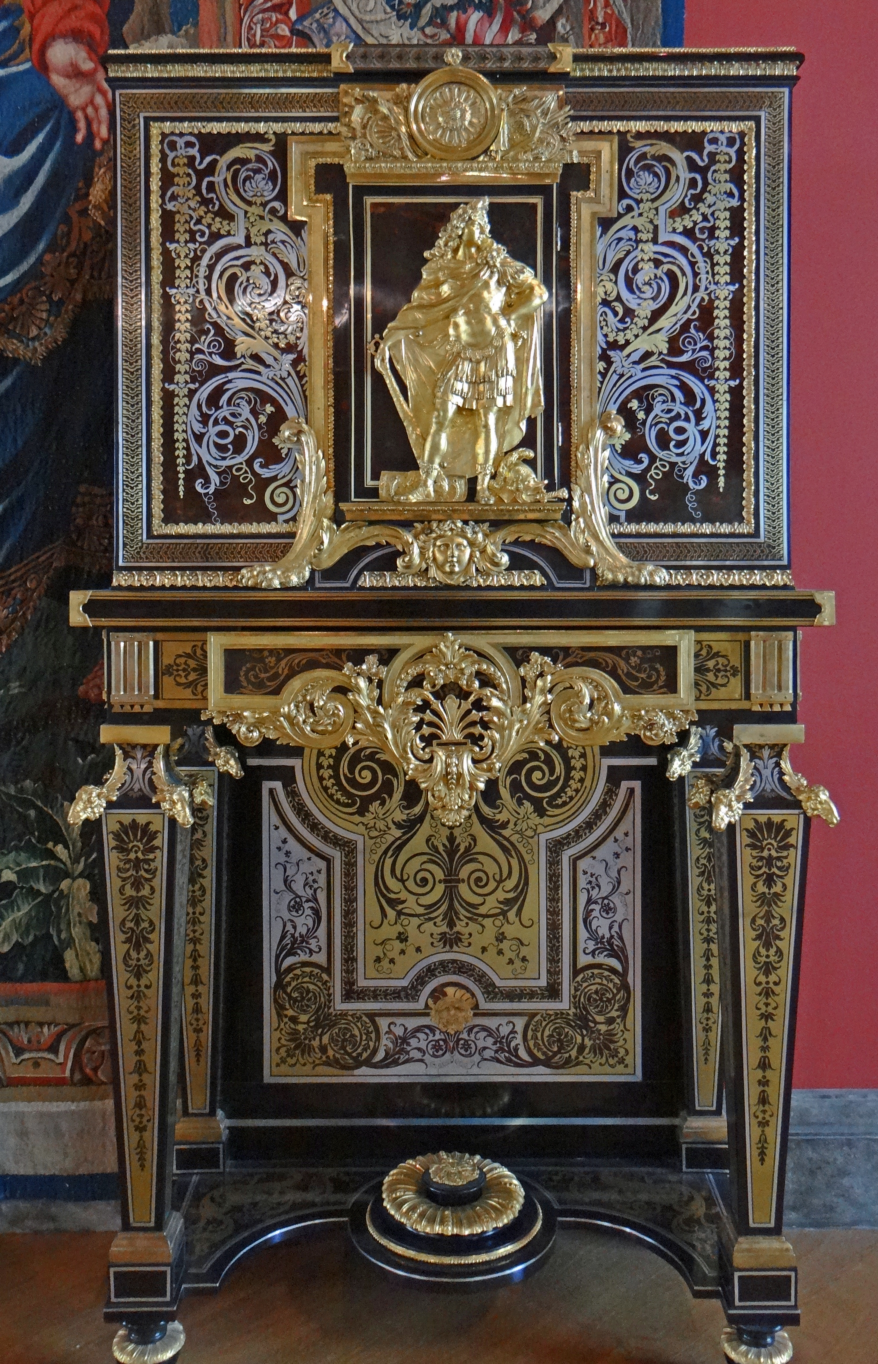 Musée du Louvre - Département des Objets d'art - Salle 34 -Cabinet sur piètement d'André-Charles Boulle (1690-1710) - OA 5468